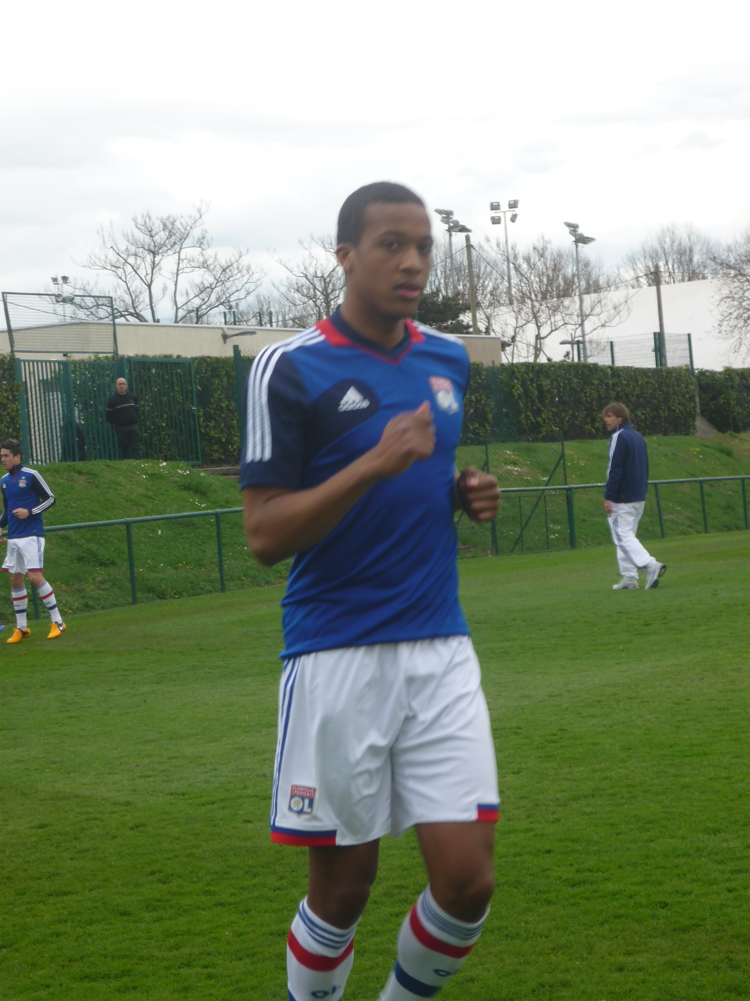 Alassane Pléa, joueur de l'Olympique lyonnais, à l'entrainement en avril 2013